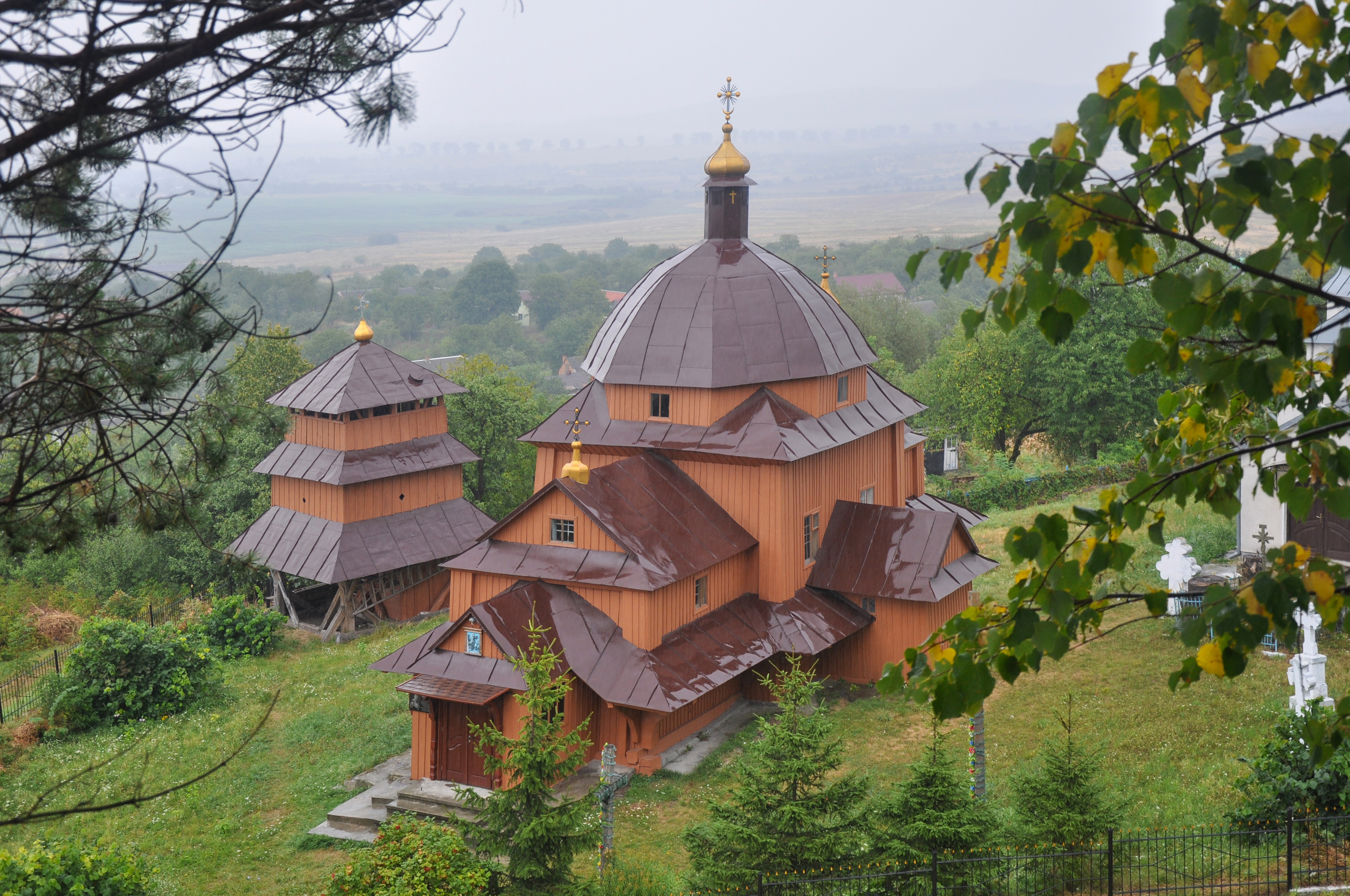 Церква Св.Юрія (дер.), с.Гринів